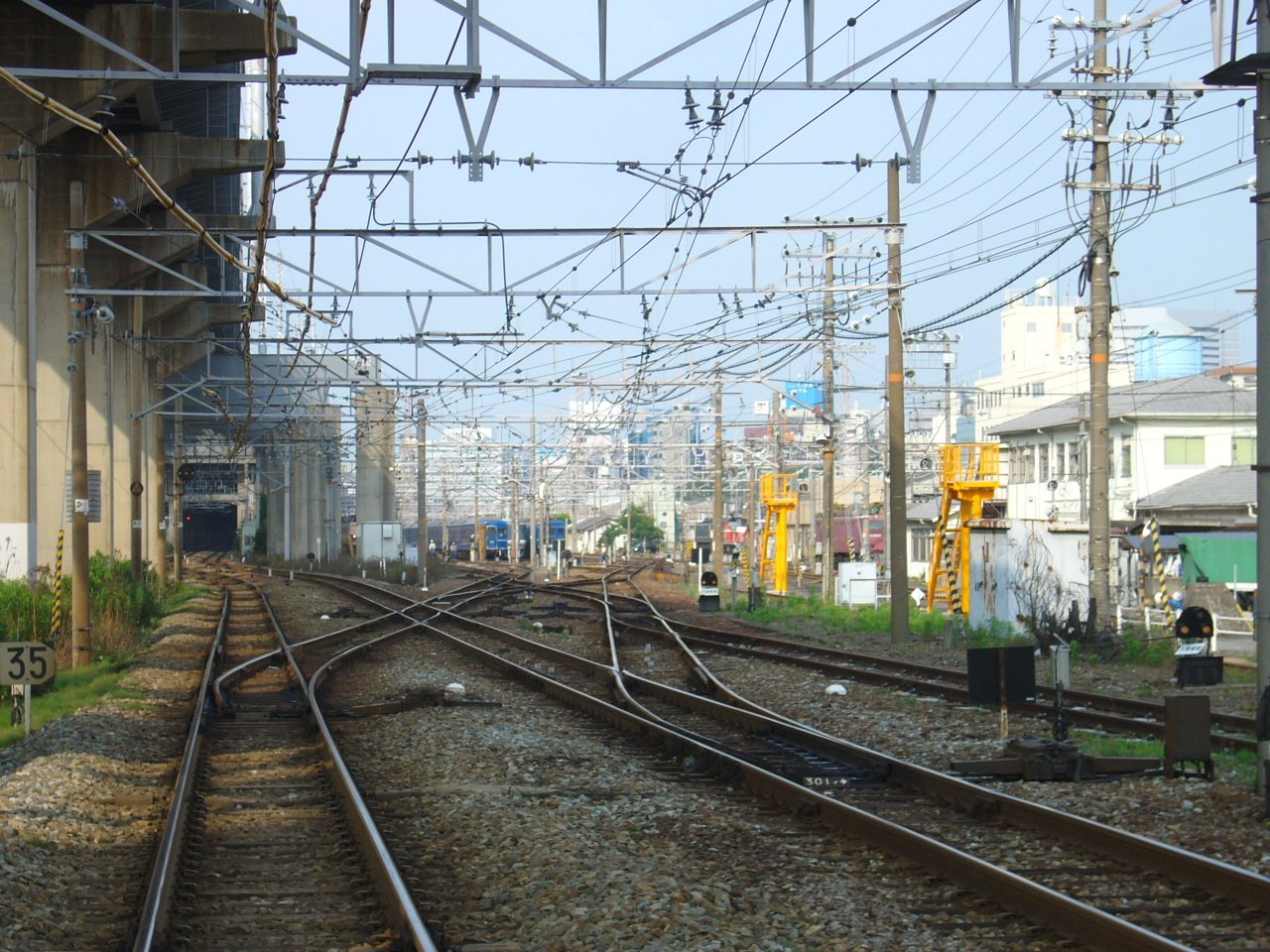 北方貨物線（左手の複線）とja:宮原総合運転所（右手奥） 踏切から撮影 淀川区木川西4丁目